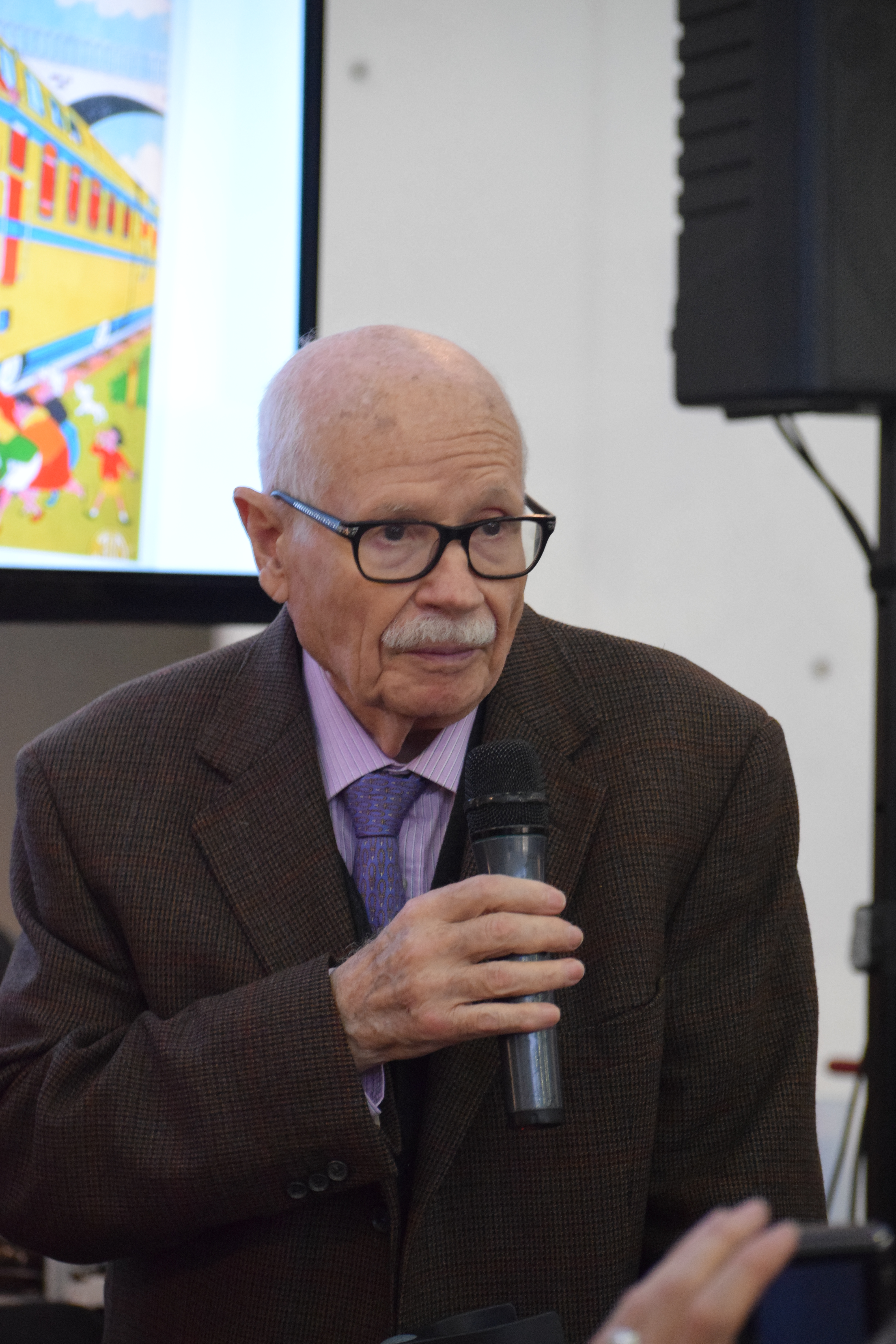 El veterà dibuixant de la revista de còmics TBO, Josep Maria Blanco Ibarz, pronunciant un discurs just després d'haver sigut proclamat guanyador del Gran Premi del Saló del Còmic. Foto presa durant la cerimònia d’entrega dels premis del Saló Internacional del Còmic de 2016.